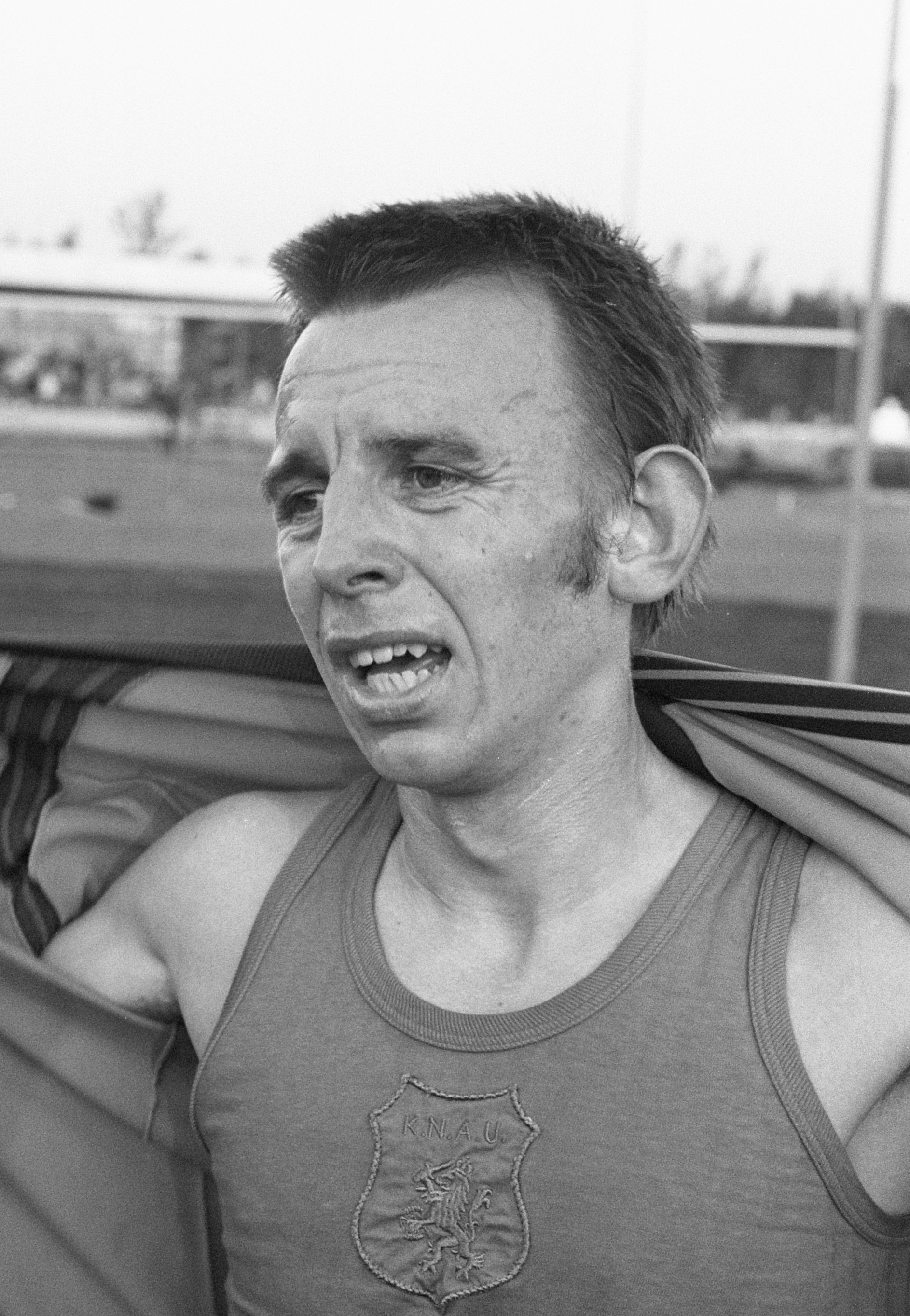 Atletiek-interland Nederland tegen Ierland te Drachten,Haico Scharn